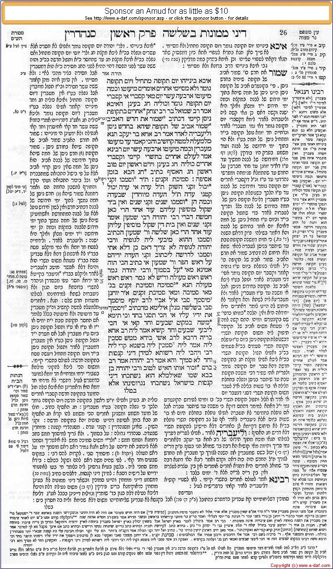 Talmud Bavli, Sanhedrin 13b